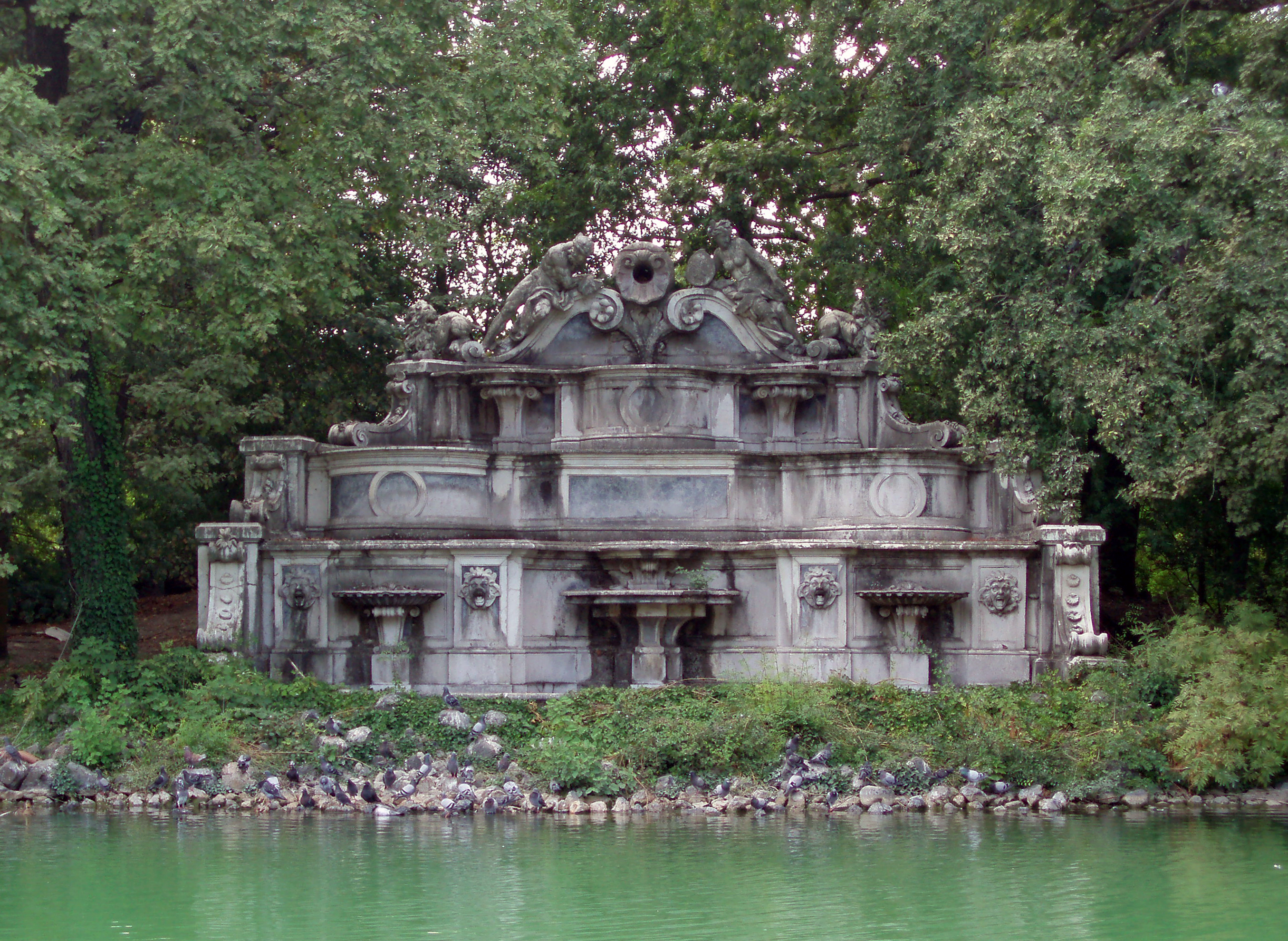 Parco Ducale This is a photo of a monument which is part of cultural heritage of Italy.